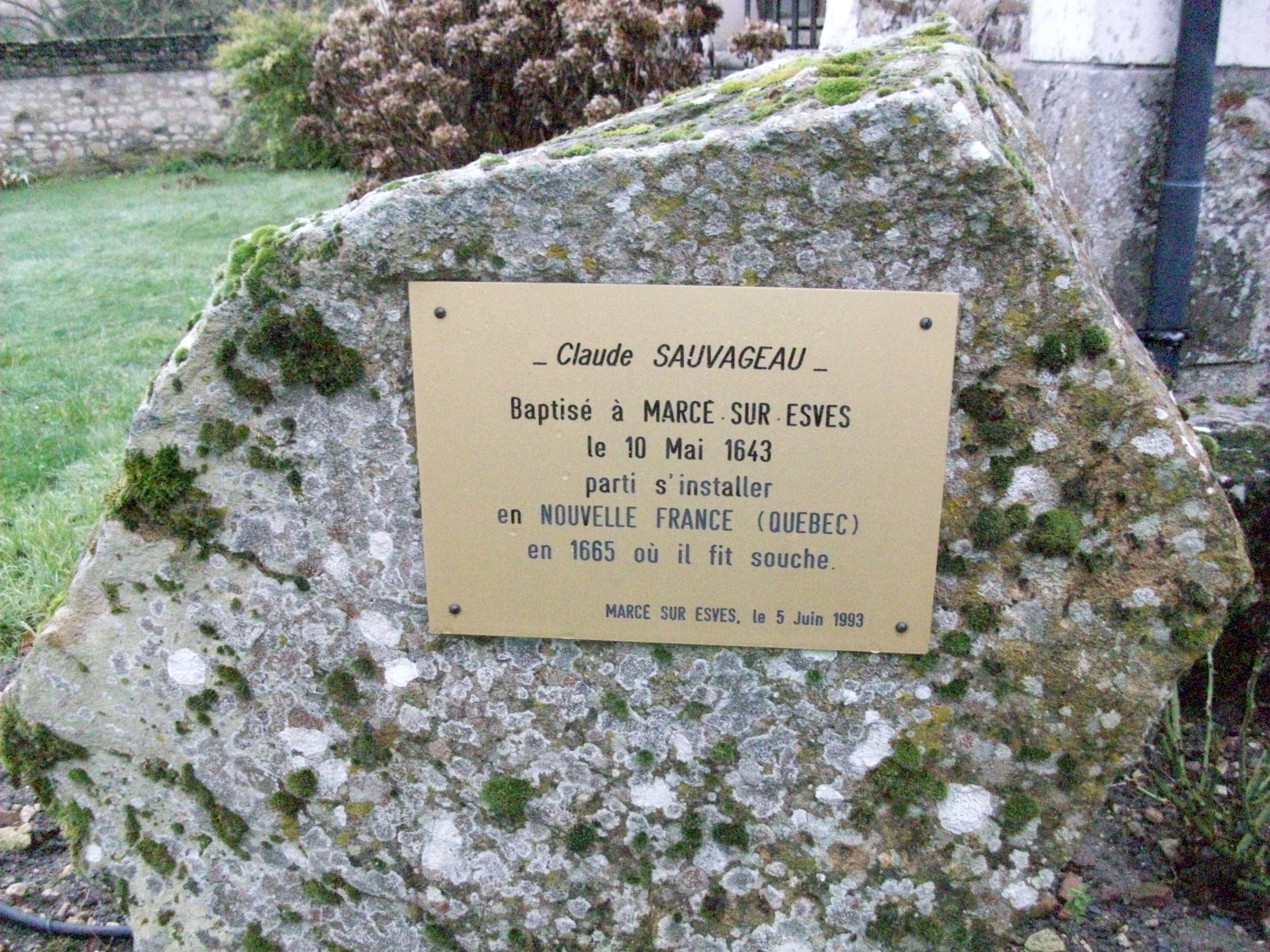 Stèle dressée à Marcé-sur-Esves (France) à la mémoire de Claude Sauvageau quio émigra en Nouvelle-France en 1685